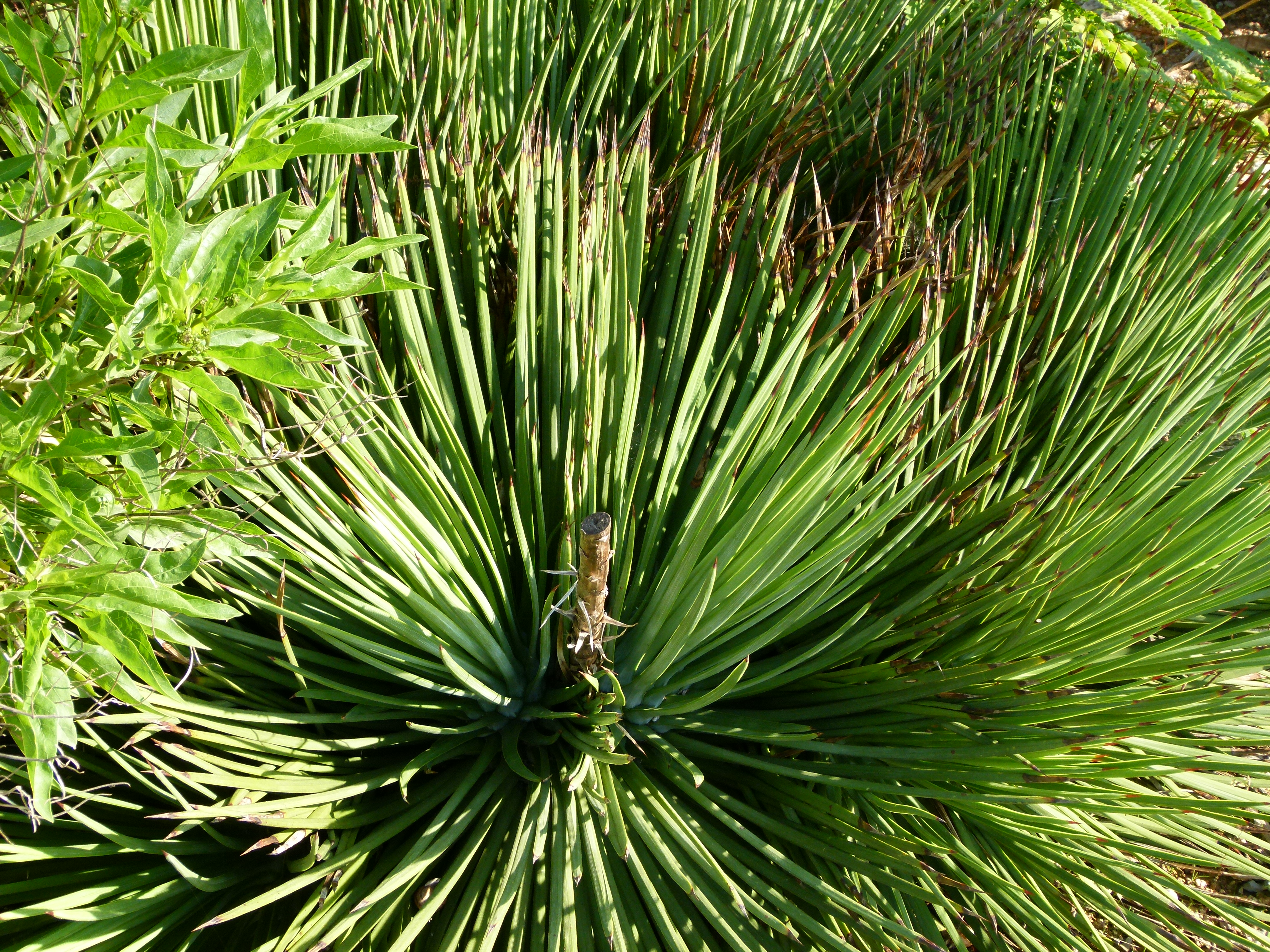 Jardin botanique Barcelone